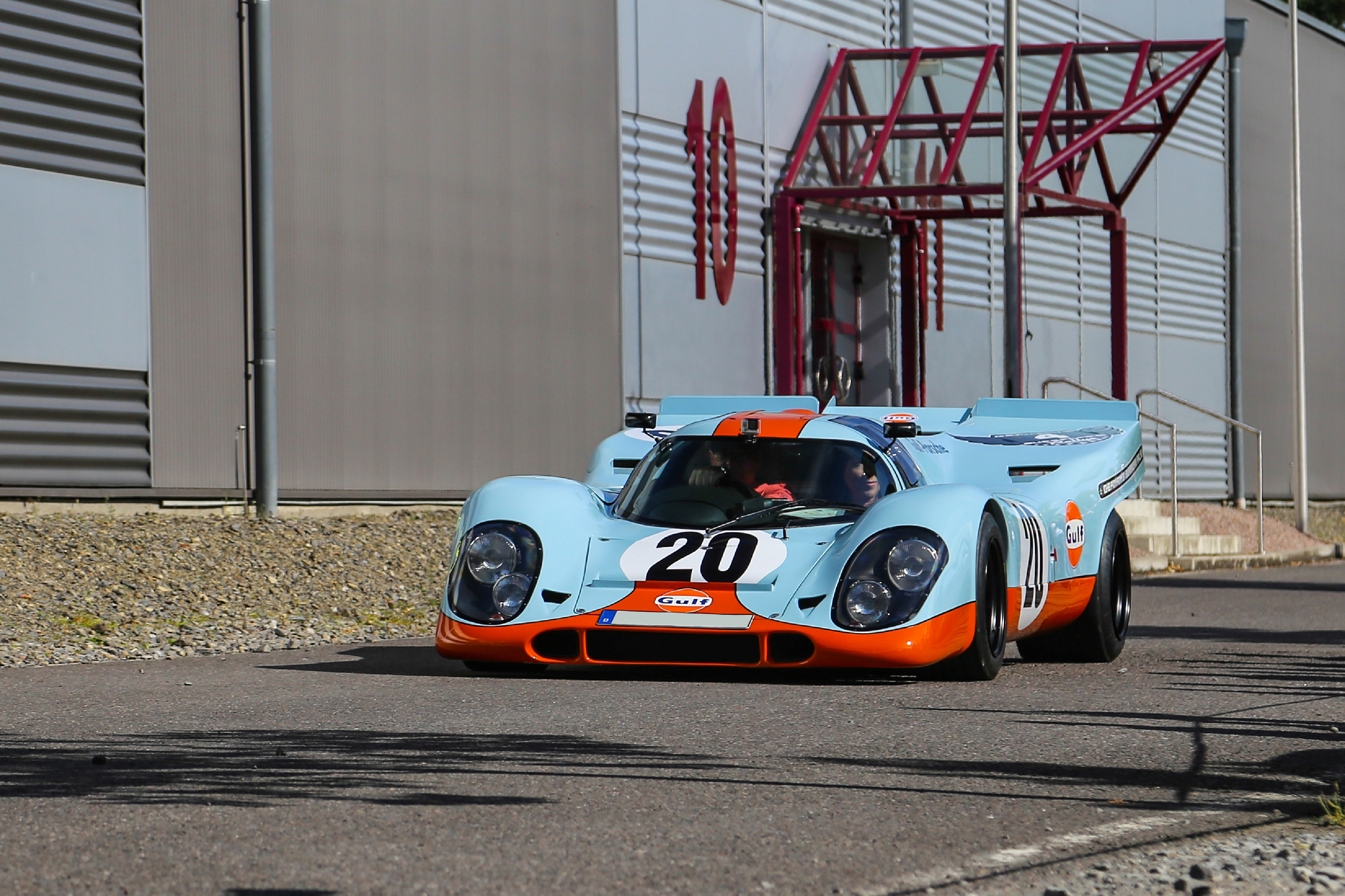 Der Porsche 917 bei der Germanys Supercars Rallye 2017